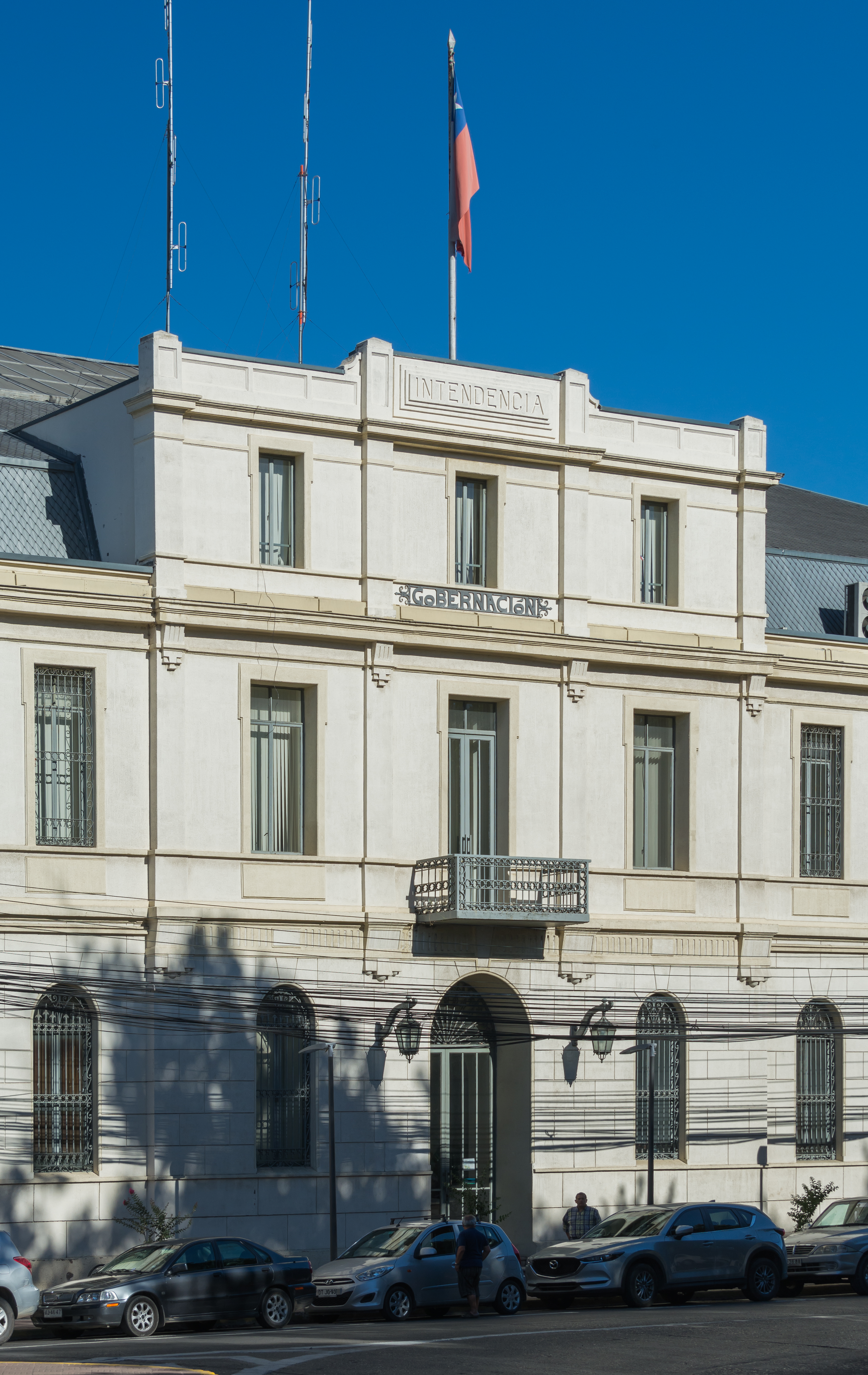 Gobernación de Linares, Región del Maule, Chile.